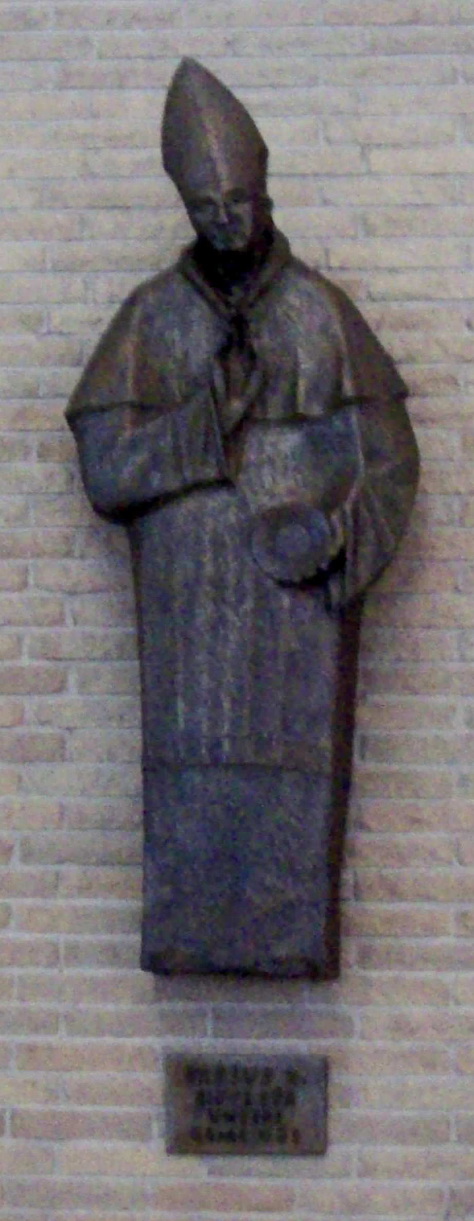 St. Pius Aschaffenburg Bronzestatue St. Pius X. geschaffen von Hermann Kröckel, Aschaffenburg